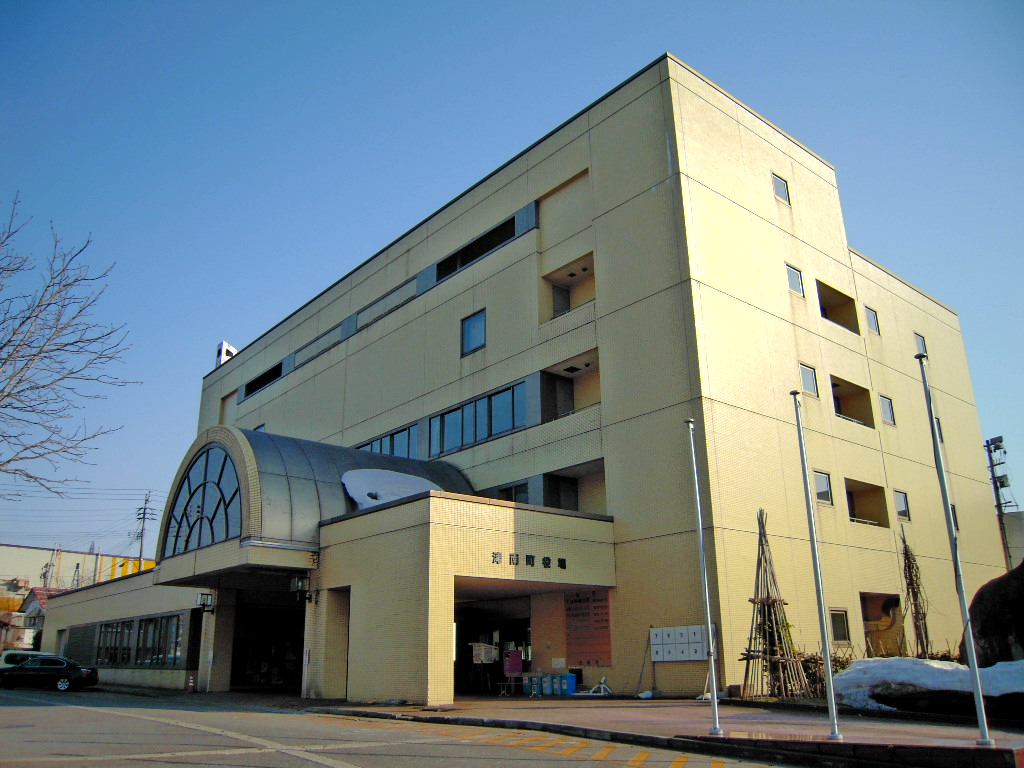 津南町役場